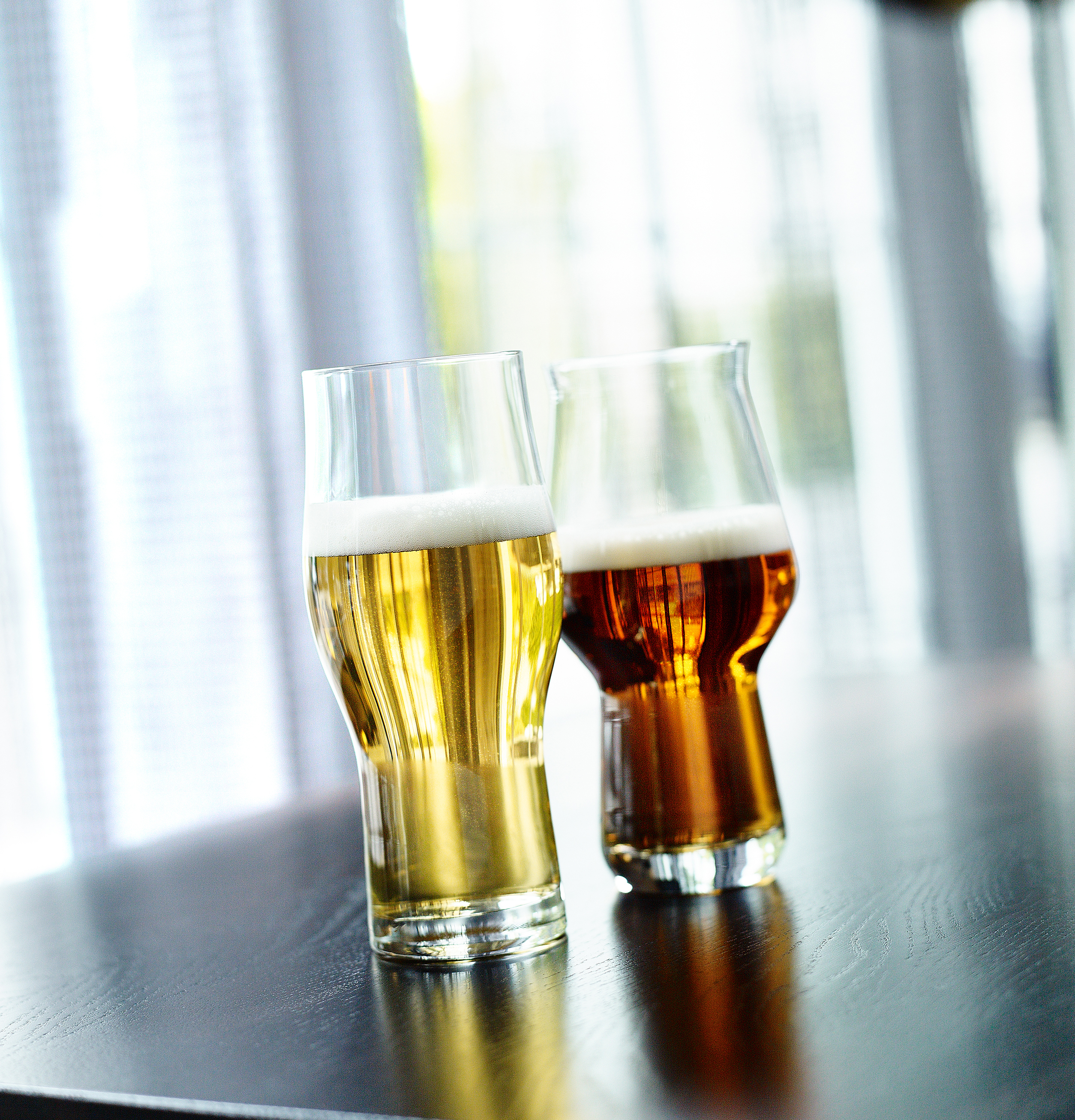 Craft Master One + Craft Master Two